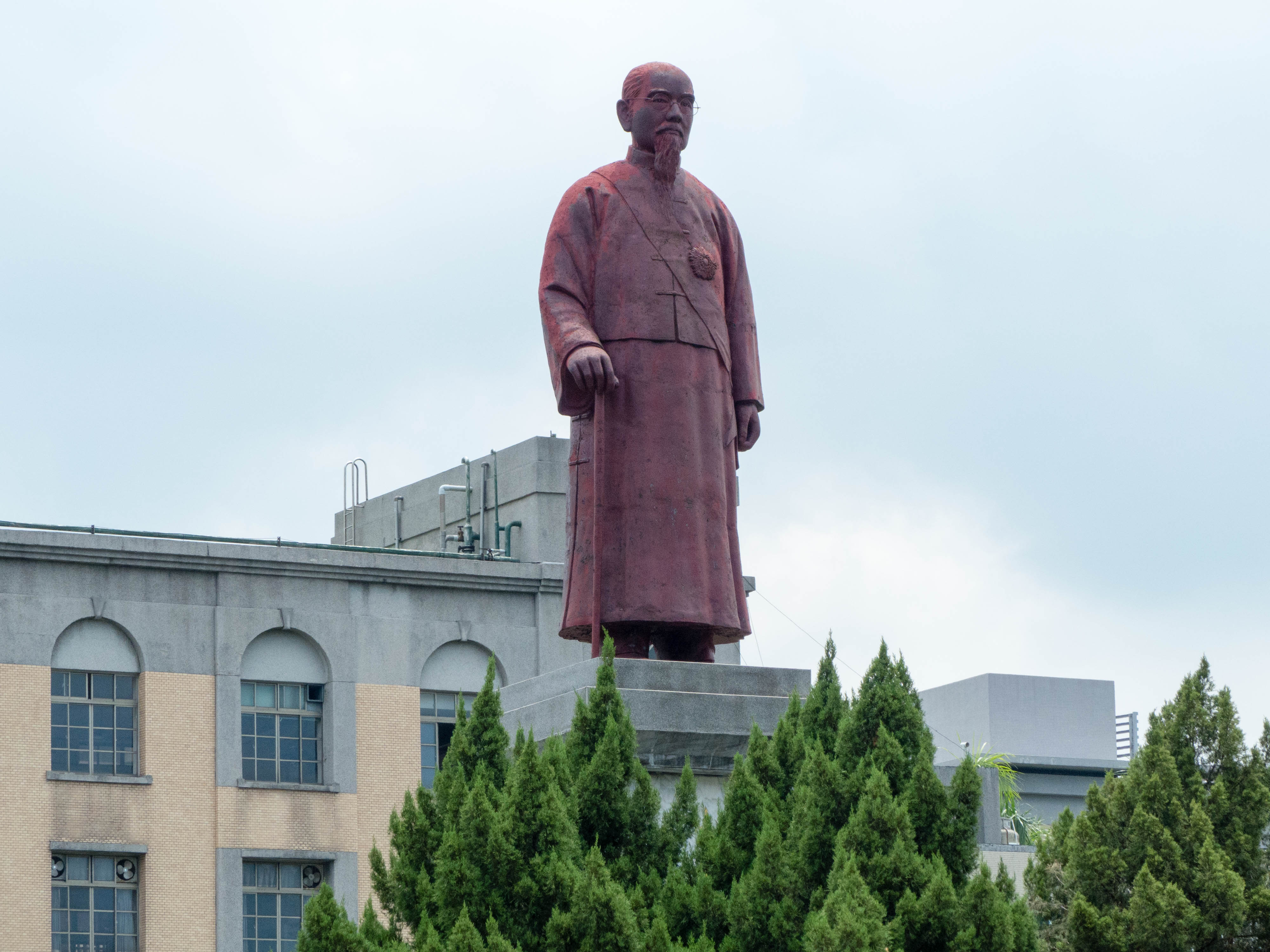 介壽公園的林森銅像右前方特寫。